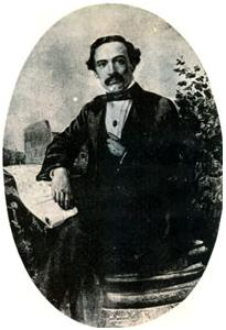 Arquitecto Ingeniero Arqueologo Ramón Rodríguez Arangoiti